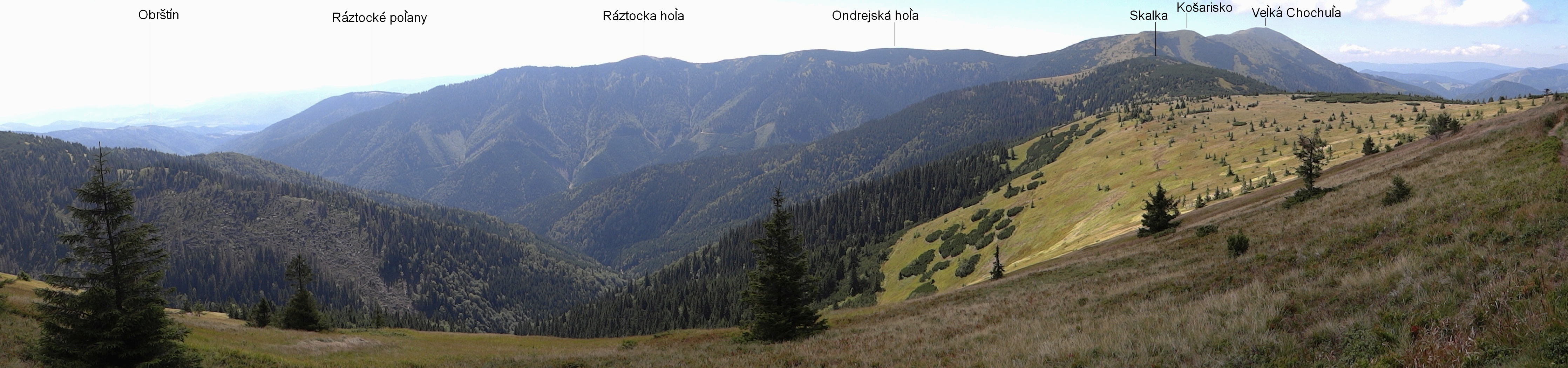 Jasenianská dolina